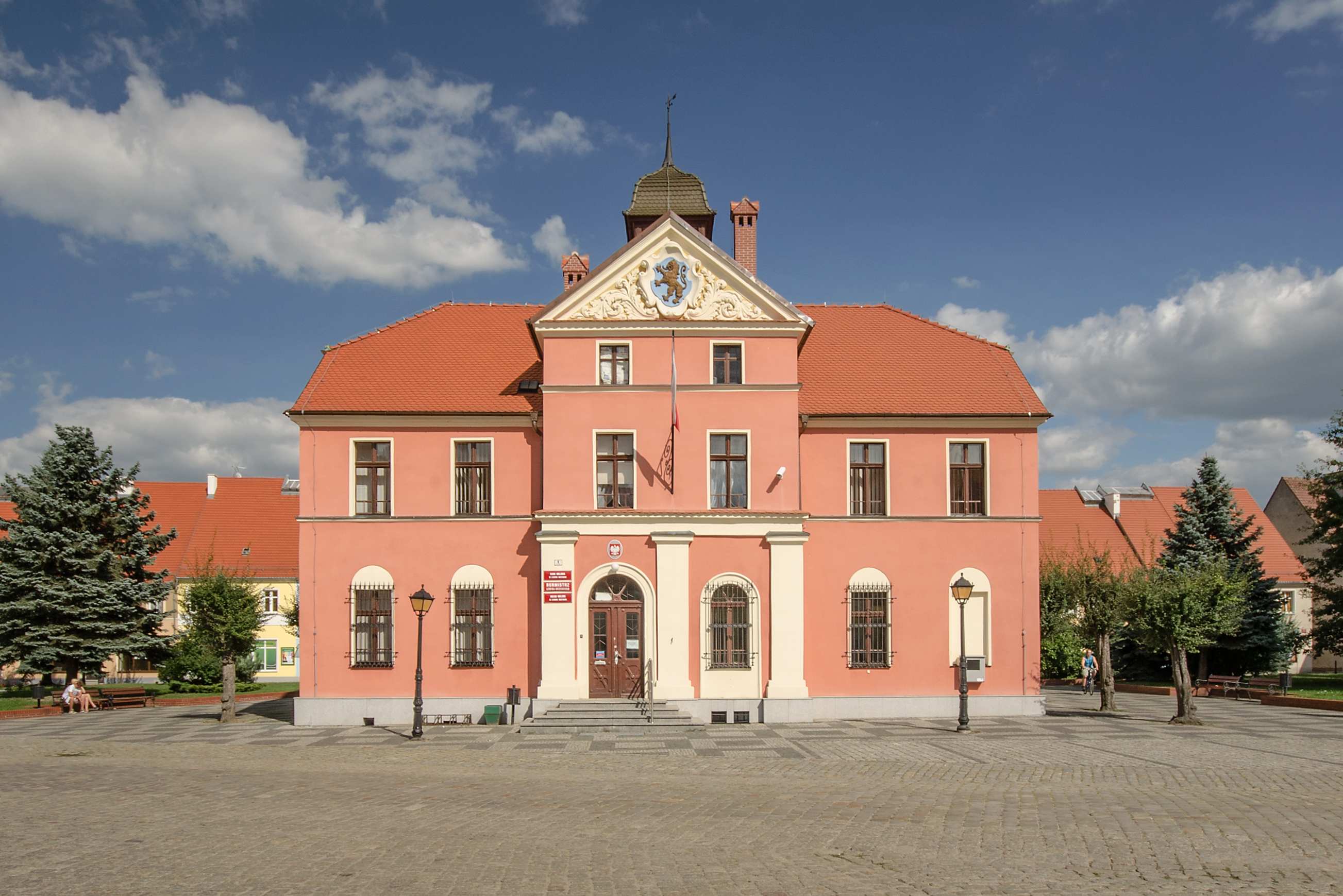 Lewin Brzeski, ratusz